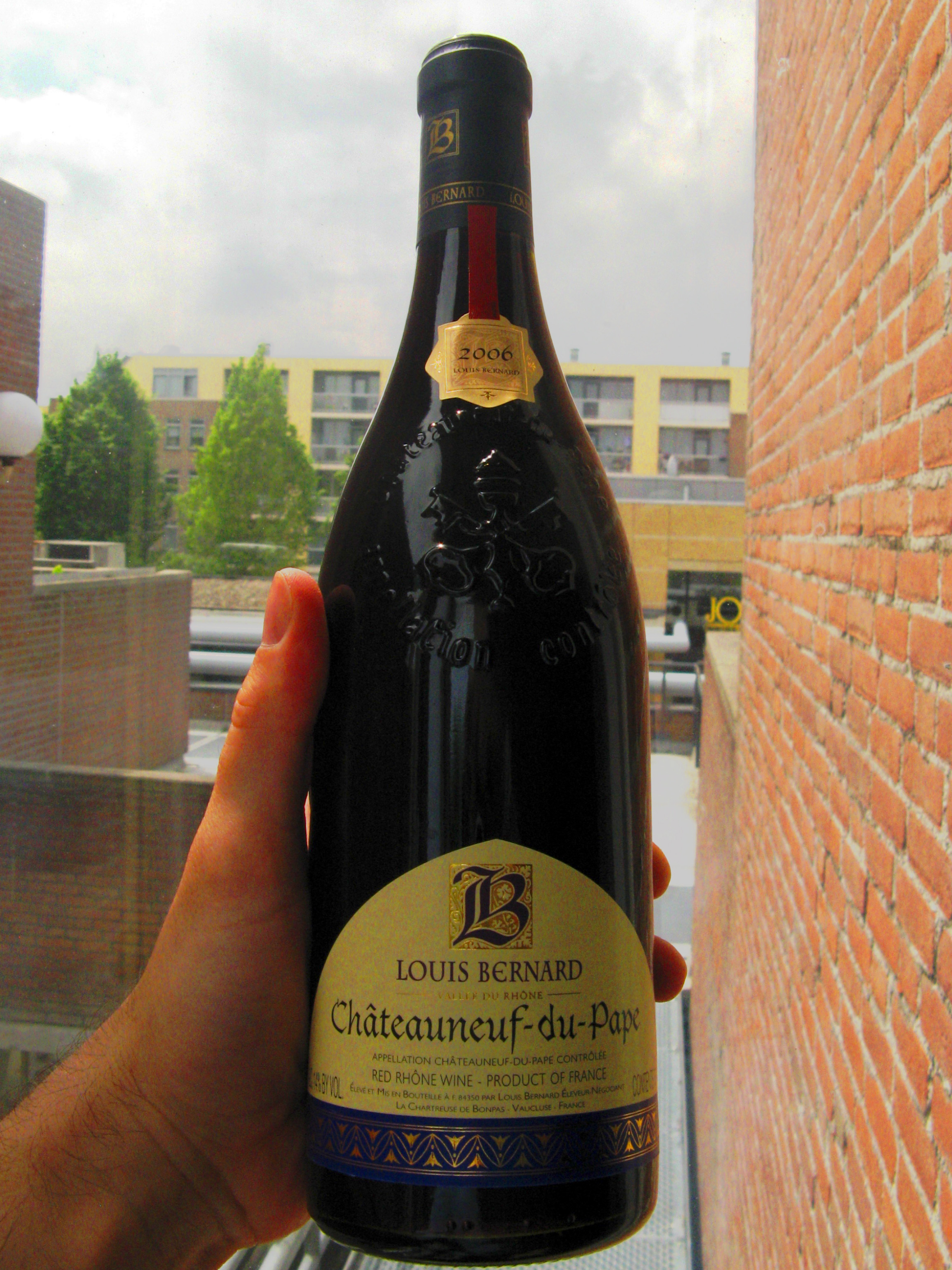 Châteauneuf-du-pape de Louis Bernard Chartreuse de Bonpas